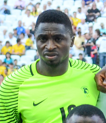 São Paulo - Alemanha vence a Nigéria por 2 a 0 e se classifica para a final na Arena Corinthians (Rovena Rosa/Agência Brasil)